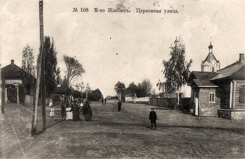 Беларуская (тарашкевіца): Жлобін (Žłobin), вуліца Царкоўная (vulica Carkoŭnaja)